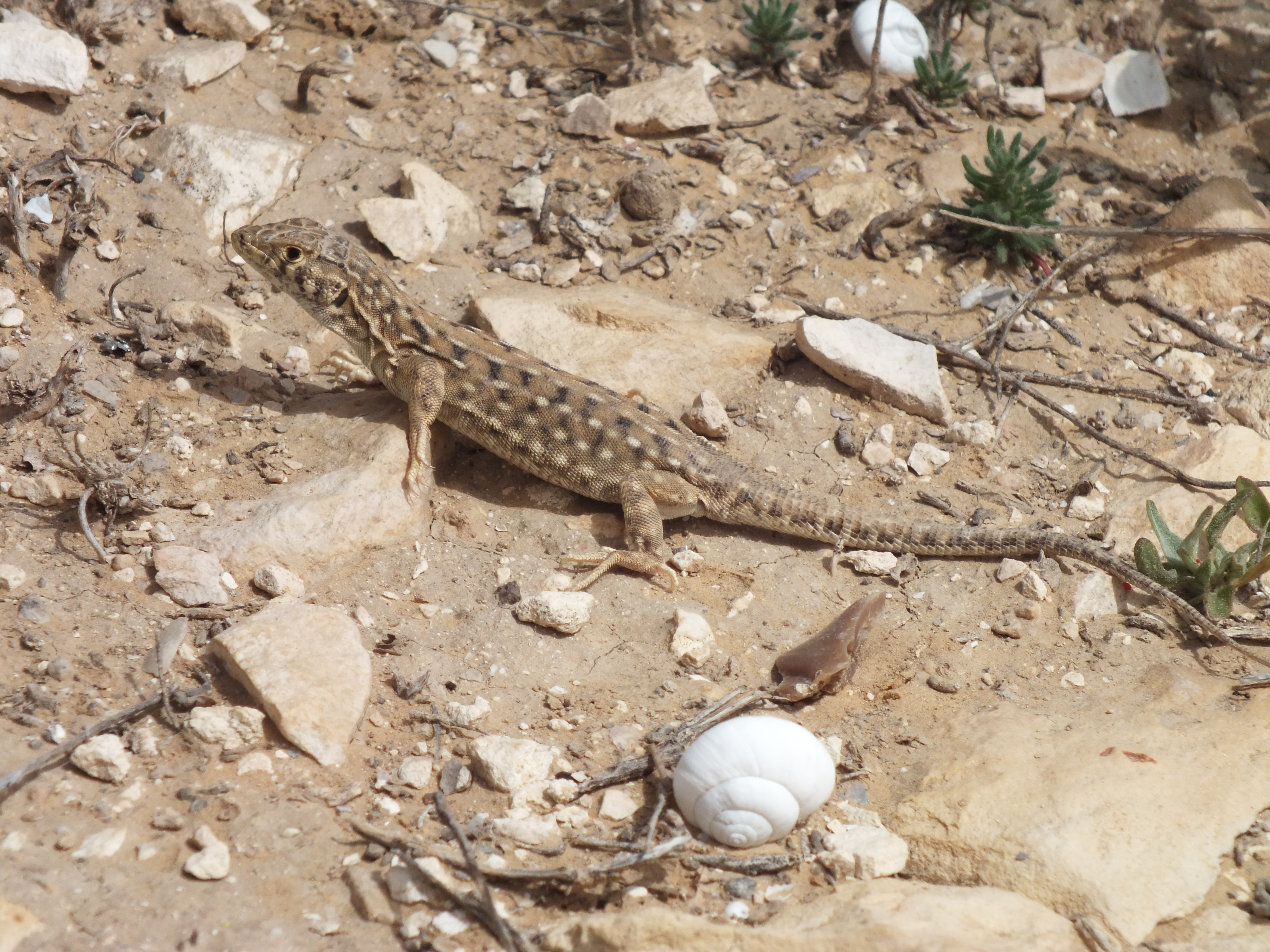 שנונית באר-שבע היא מין של לטאה אנדמית לישראל שחיה במישורי וגבעות הלס של הנגב שנונית באר שבע, נקבה, צולמה בגן לאומי תל ערד